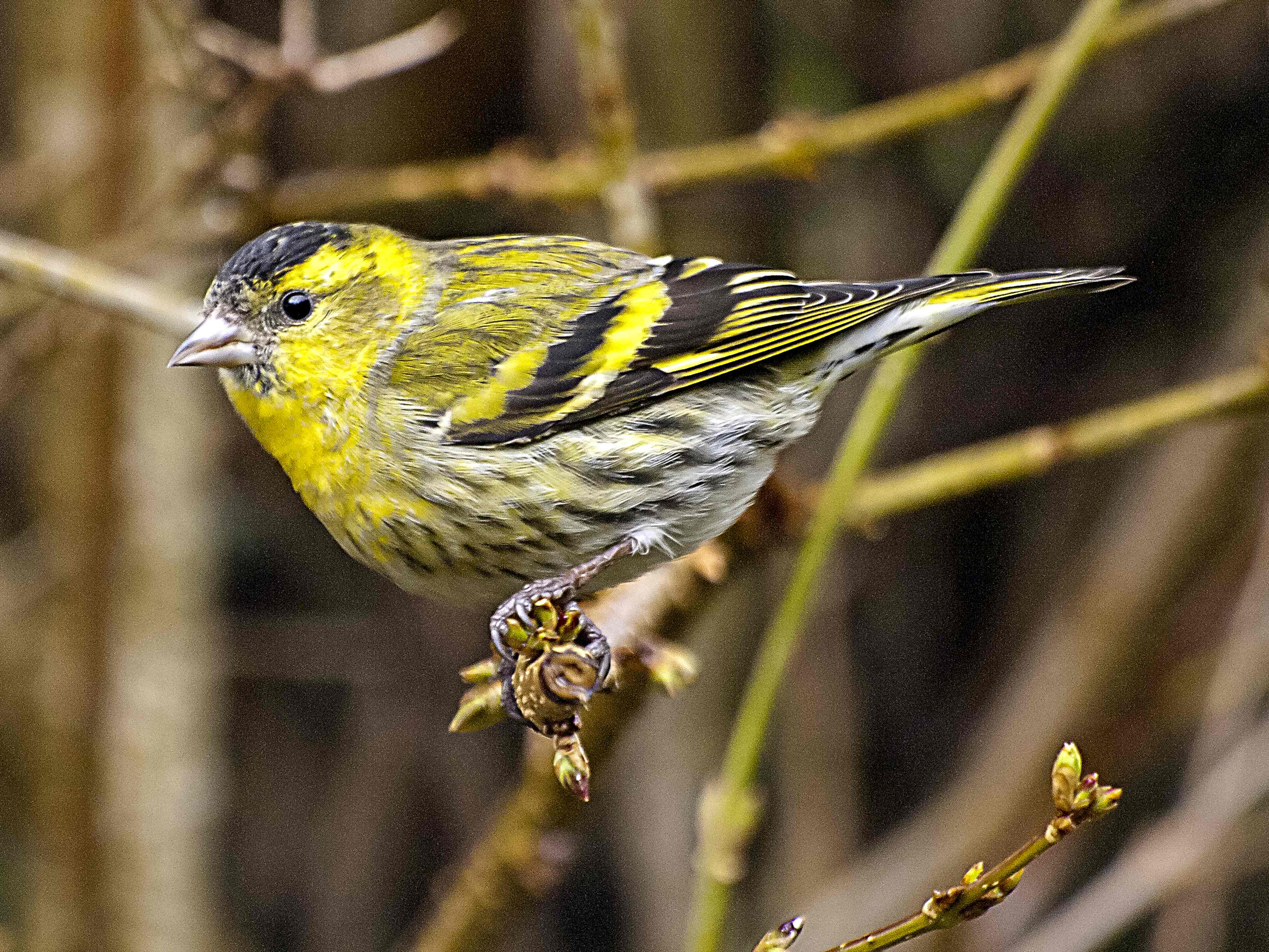 Erlenzeisig (6)